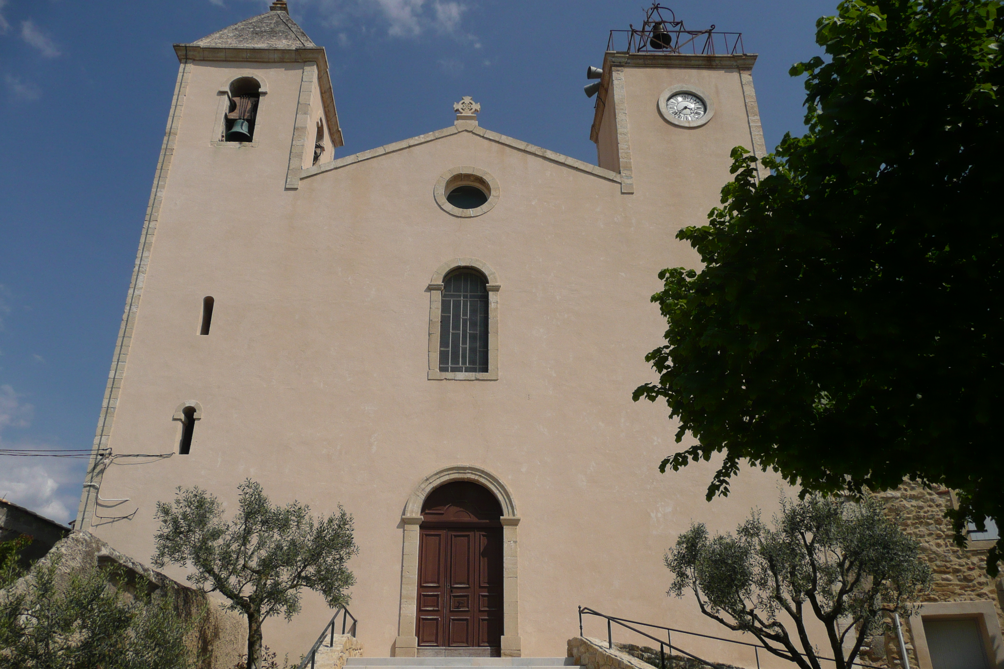 Eglise à Saint-Romain-en-Viennois.